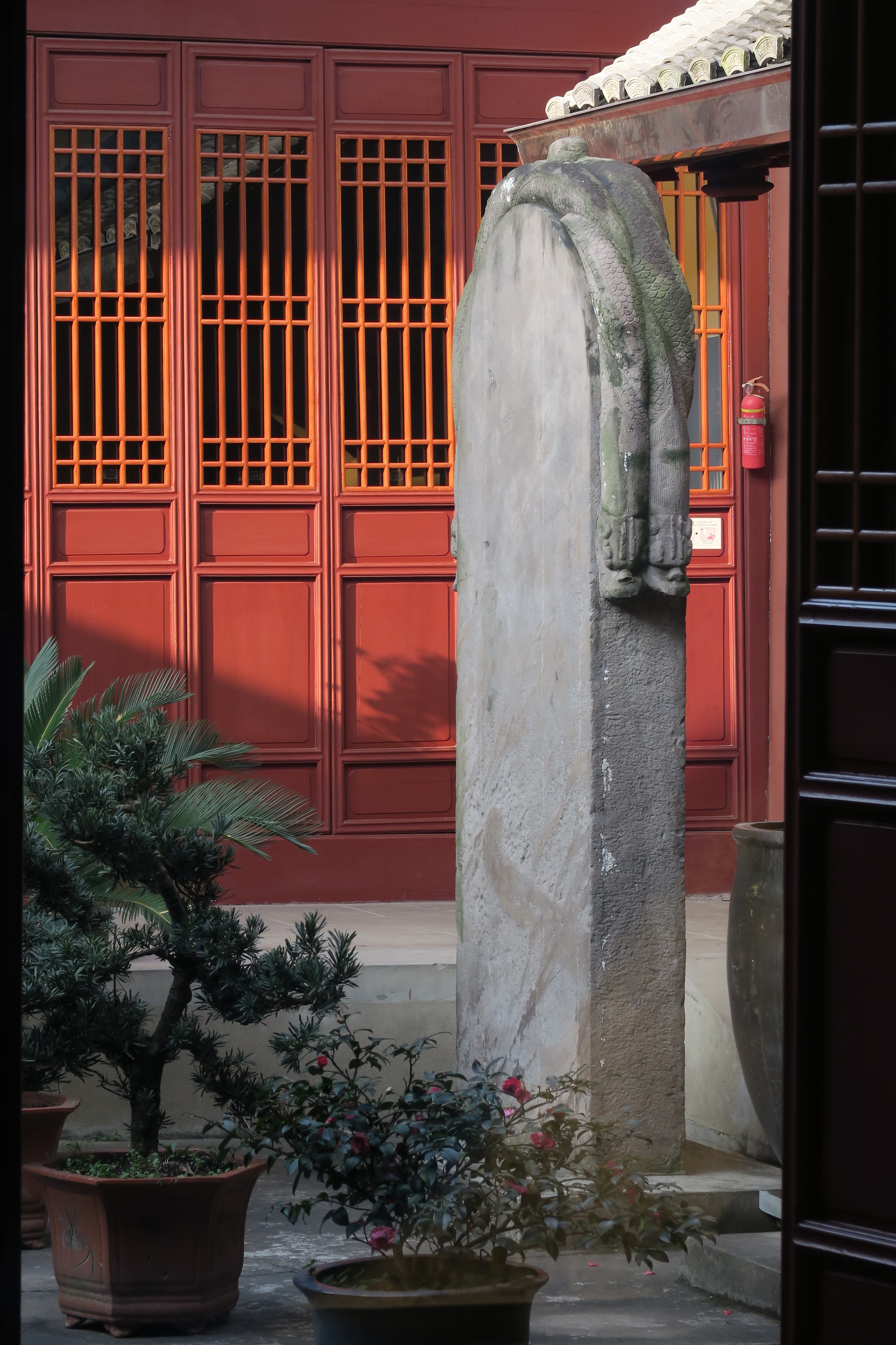 广德庵宋徽宗御笔碑